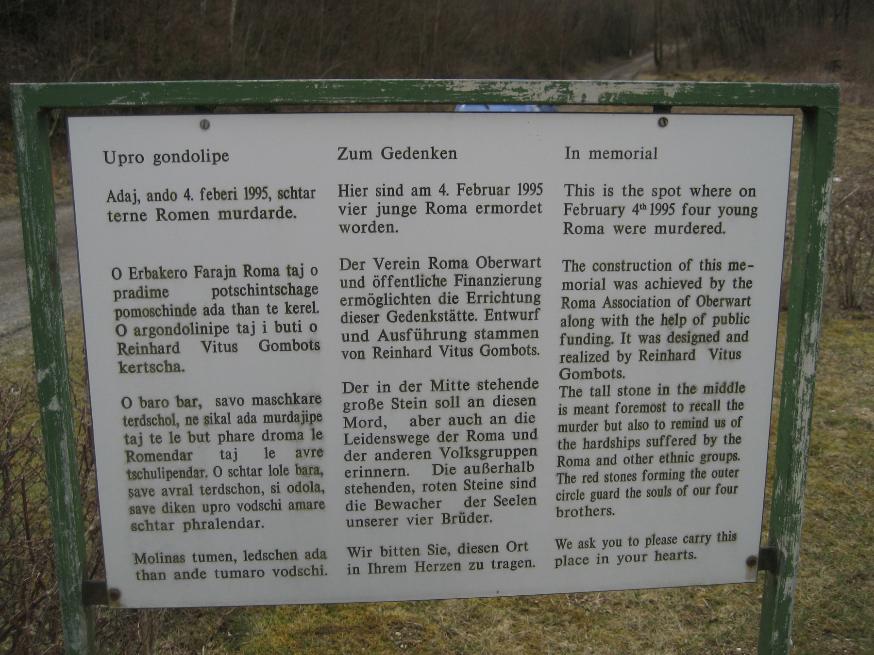 das Mahnmal für Roma und Sinti in Oberwart